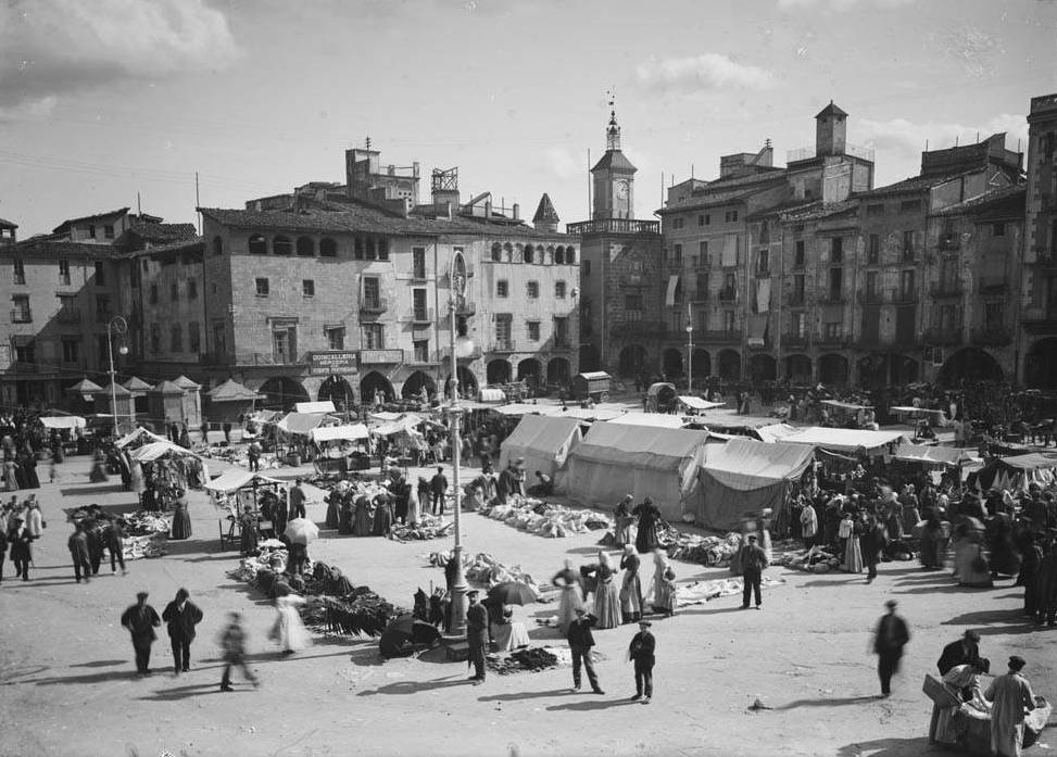 Imatge